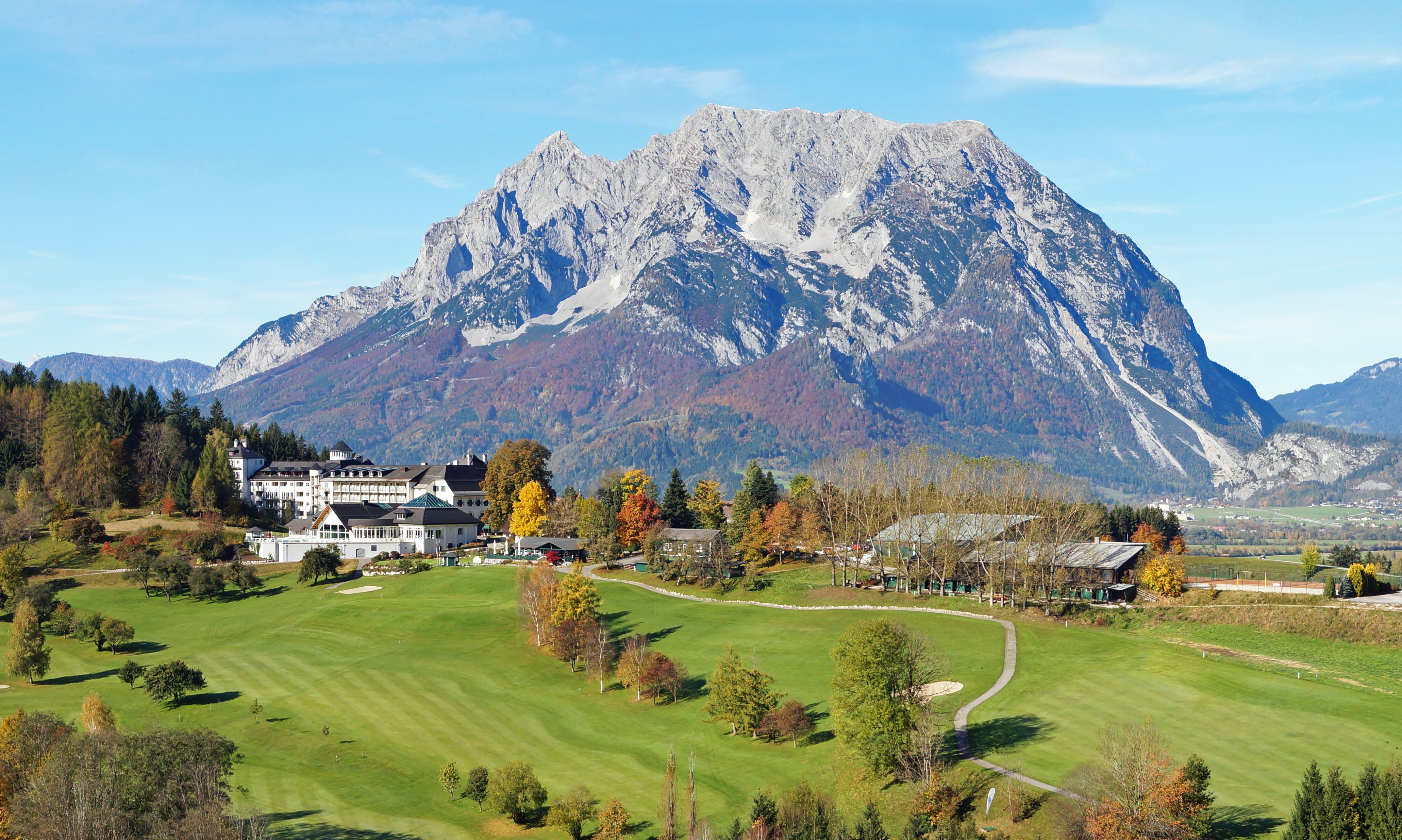 Schloss Pichlarn mit Grimming im Hintergrund